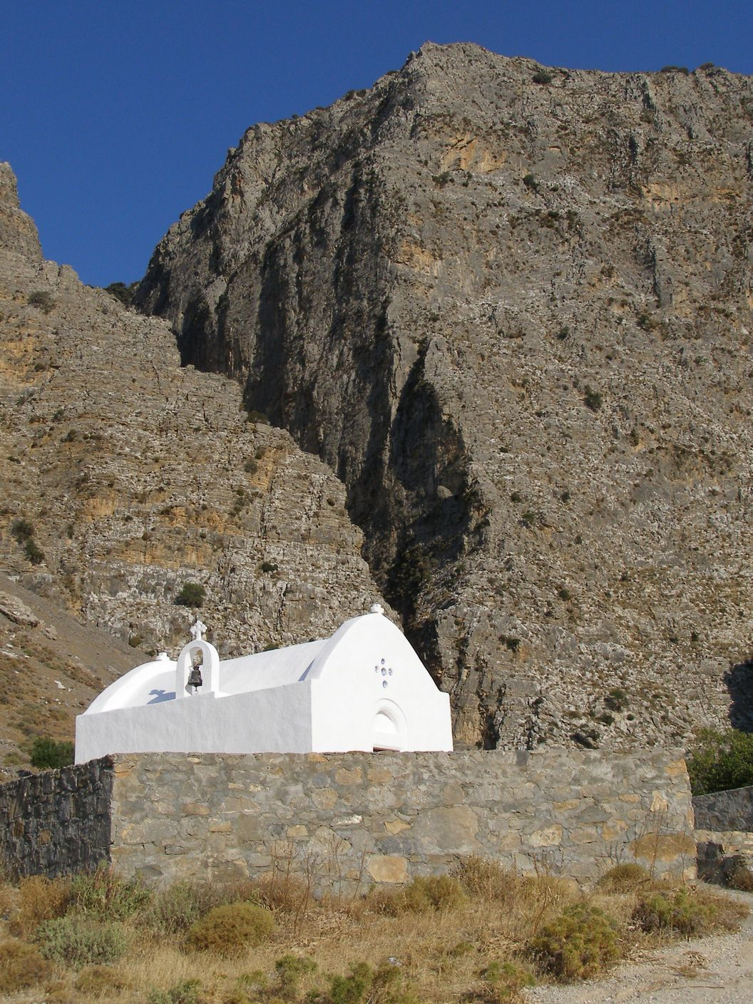 Die Cha-Schlucht in Ost-Kreta